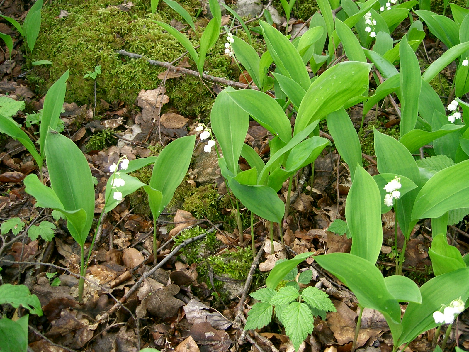 Muguet sauvage. Photo personnelle PRA